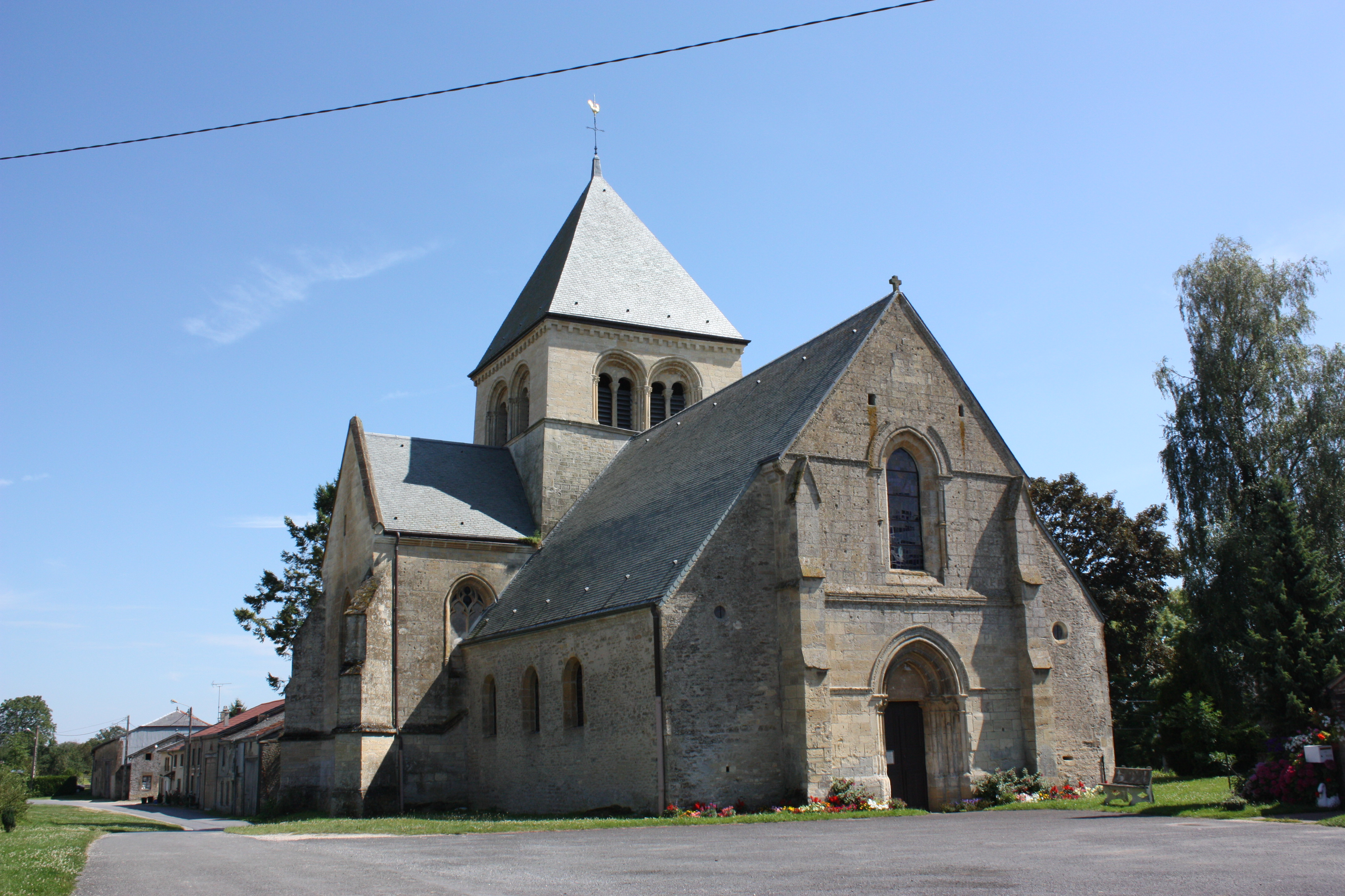 Église Sainte-Catherine d'Alland'Huy-et-Sausseuil (Ardennes, France) .